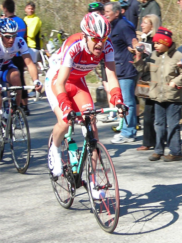 Giampaolo Cheula sulle Manie alla Milano-Sanremo 2009